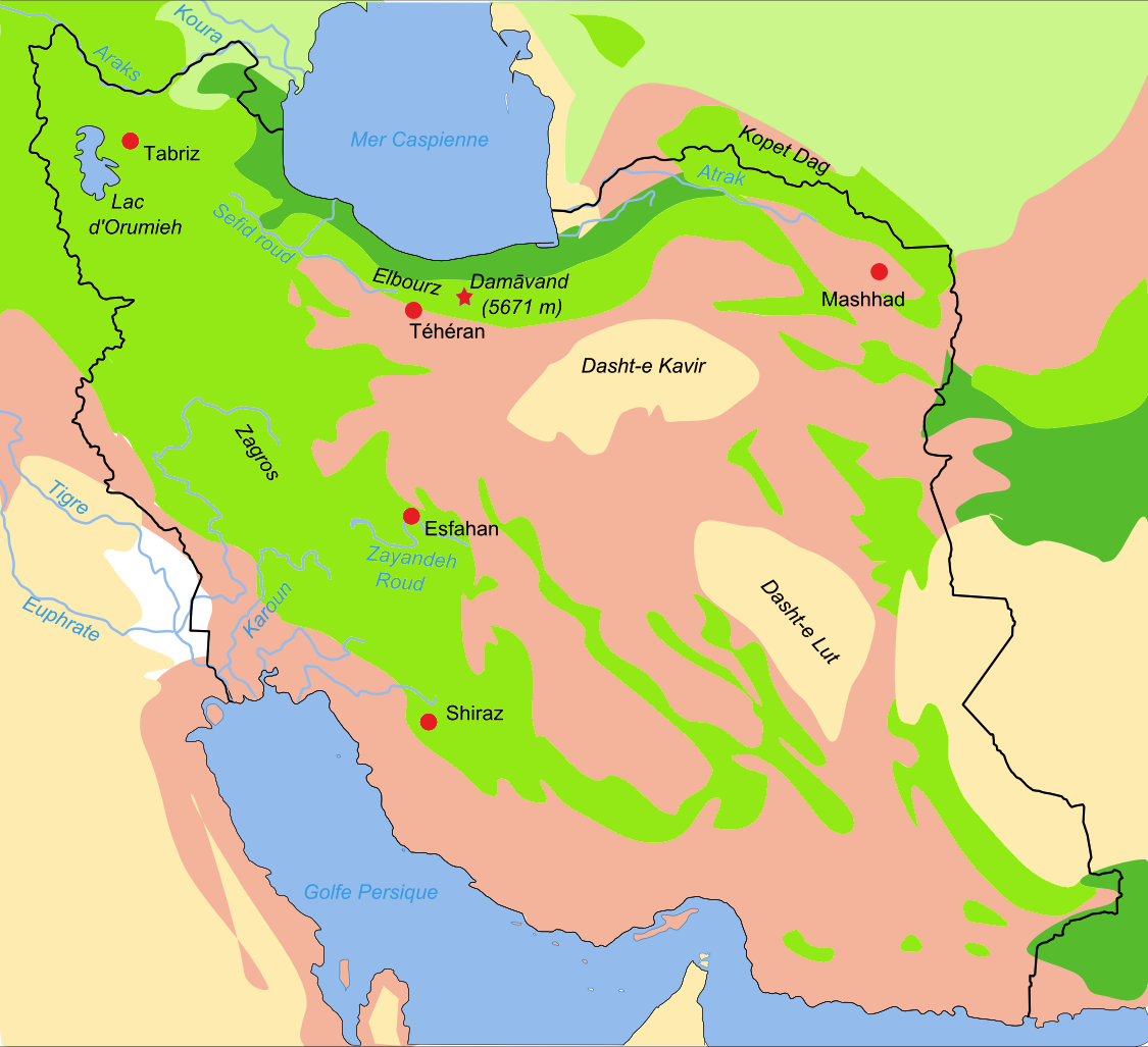 Simplified/improved version of Image:Iran biotopes.png, in french Forest steppe/Steppe arborée Forests and woodlands/Zones arborées Semi-desert/zones semi désertiques Desert lowlands/plaines désertiques Steppe Salted alluvial marshes/Marais saumâtres alluviaux